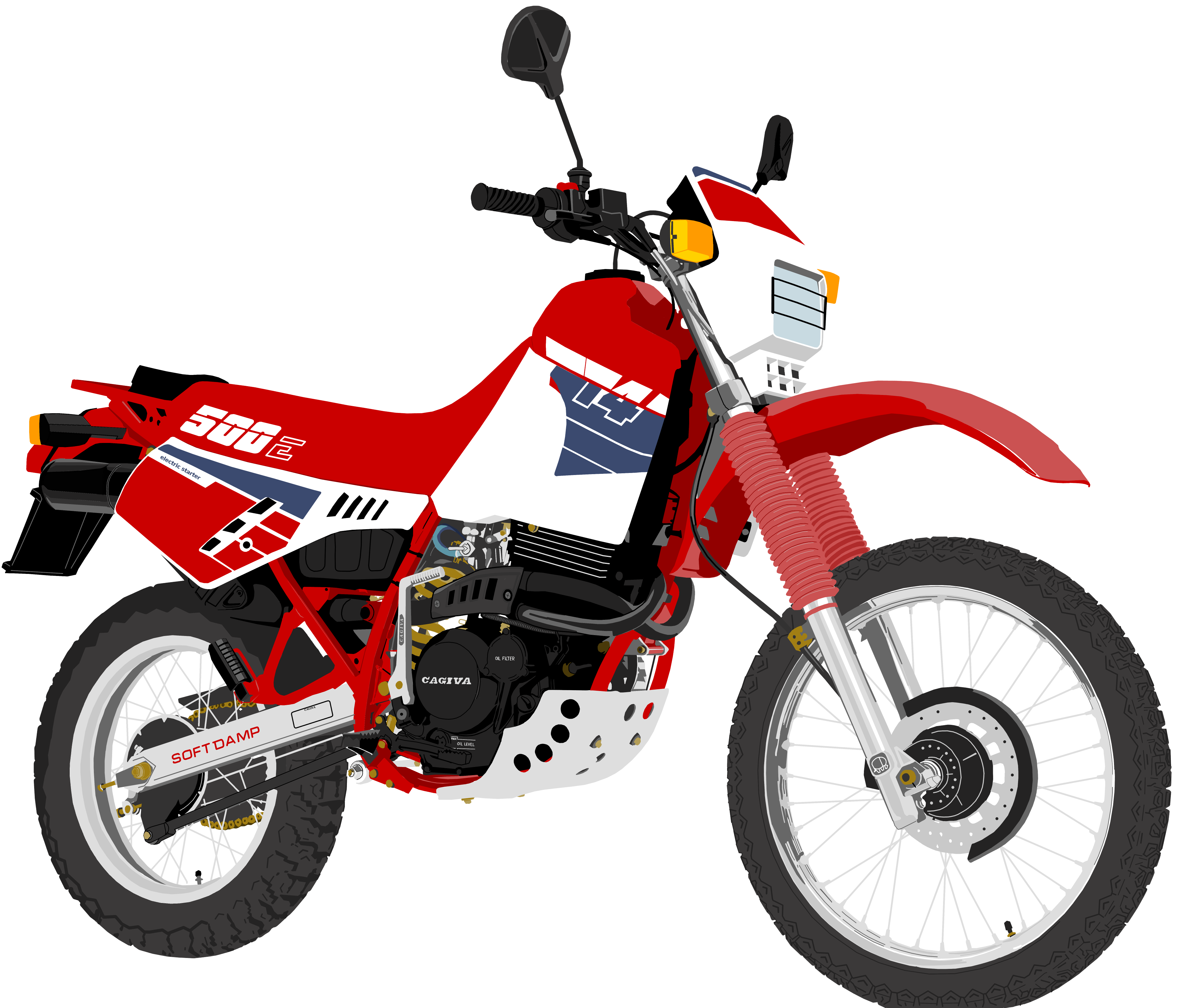 Cagiva T4 500 en version équipée d'un réservoir de 24L. Dessiné sous the Gimp 2.8